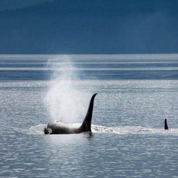 Orcas!